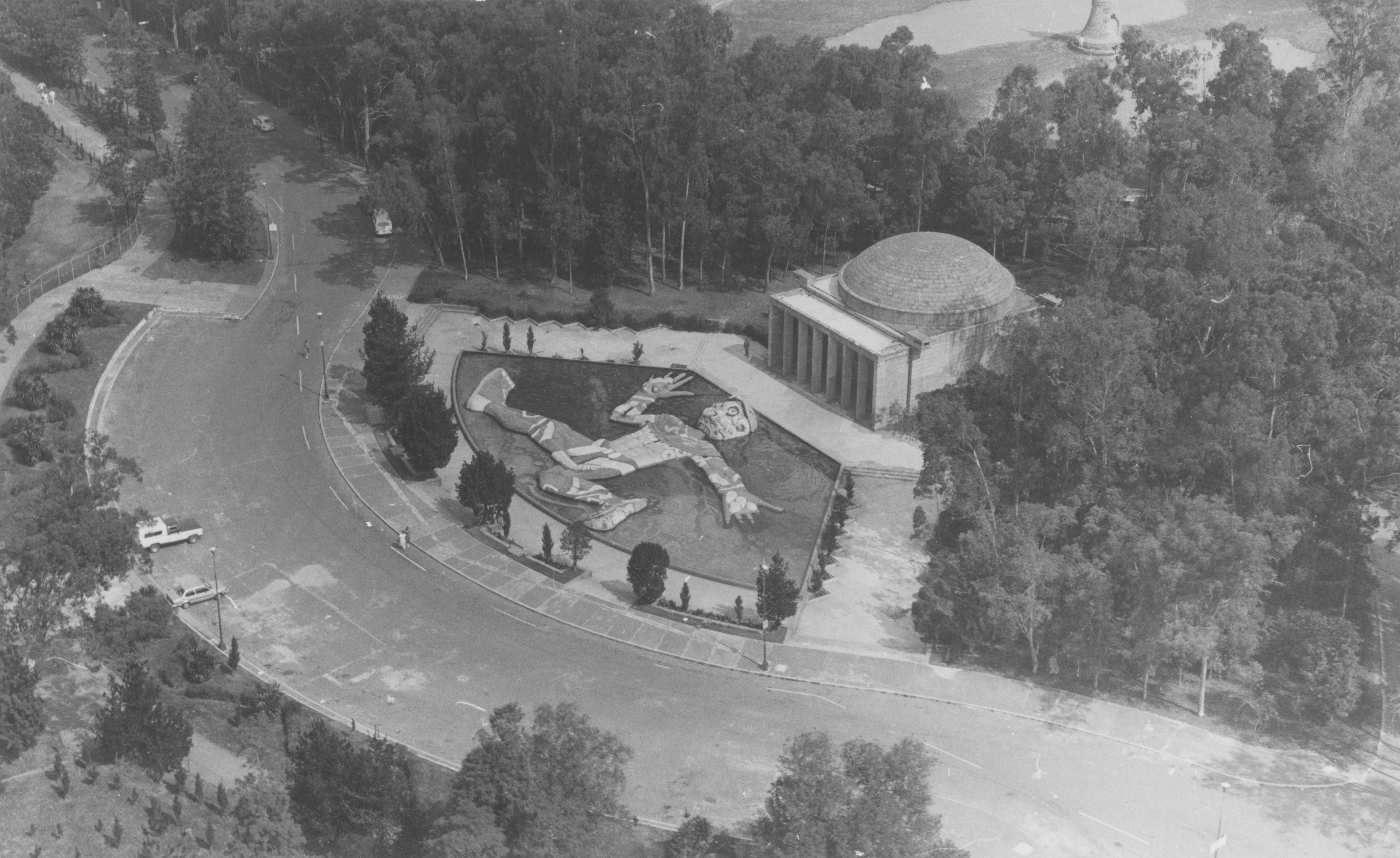 Fotografía antigua de la Ciudad de México resguardadas por el Museo Archivo de la Fotografía (MAF) de la Ciudad de México